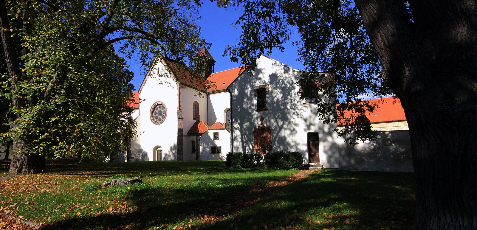 Porta Coeli kolostor- Predlkasteri (Tisnov)